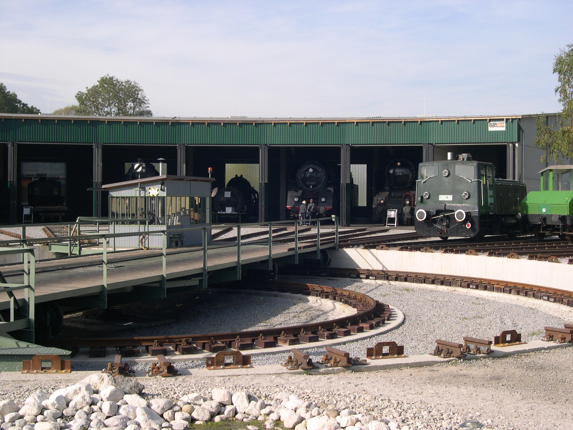 Drehscheibe und Lokschuppen des Lokpark Ampflwang der ÖGEG